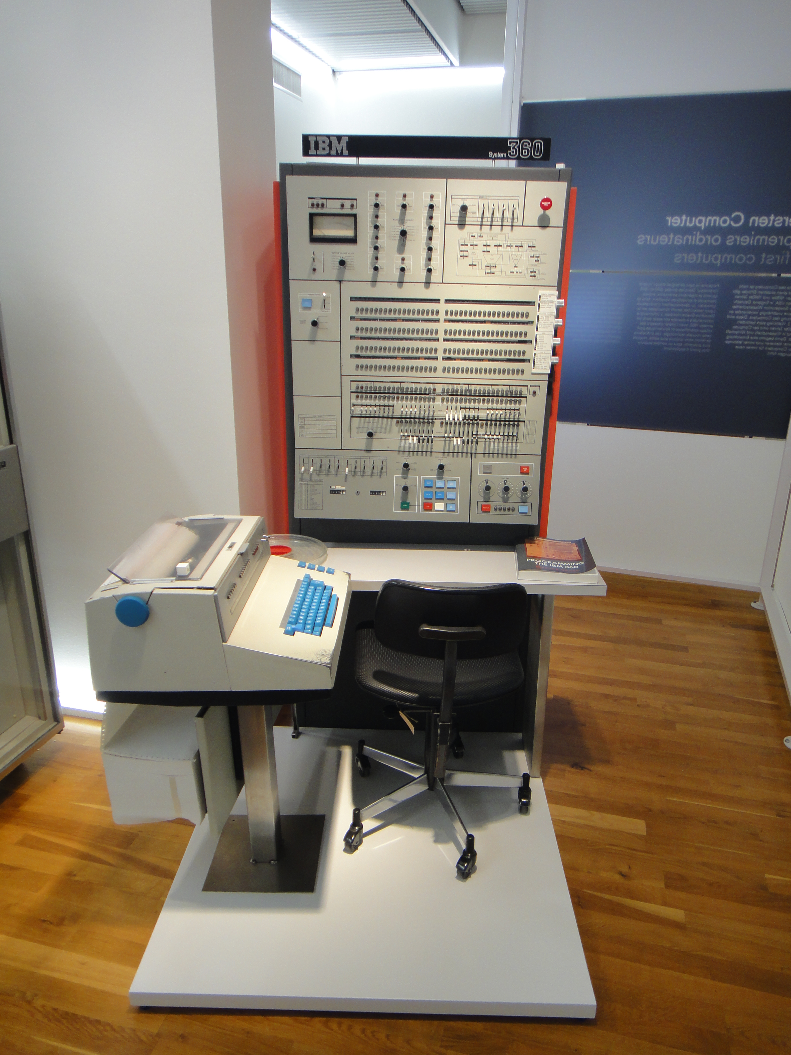 IBM System/360-50: Zentraleinheit IBM 2050, Konsoldrucker IBM 1052-7 mit Tastatur, Magnetband-Einheit IBM 2401